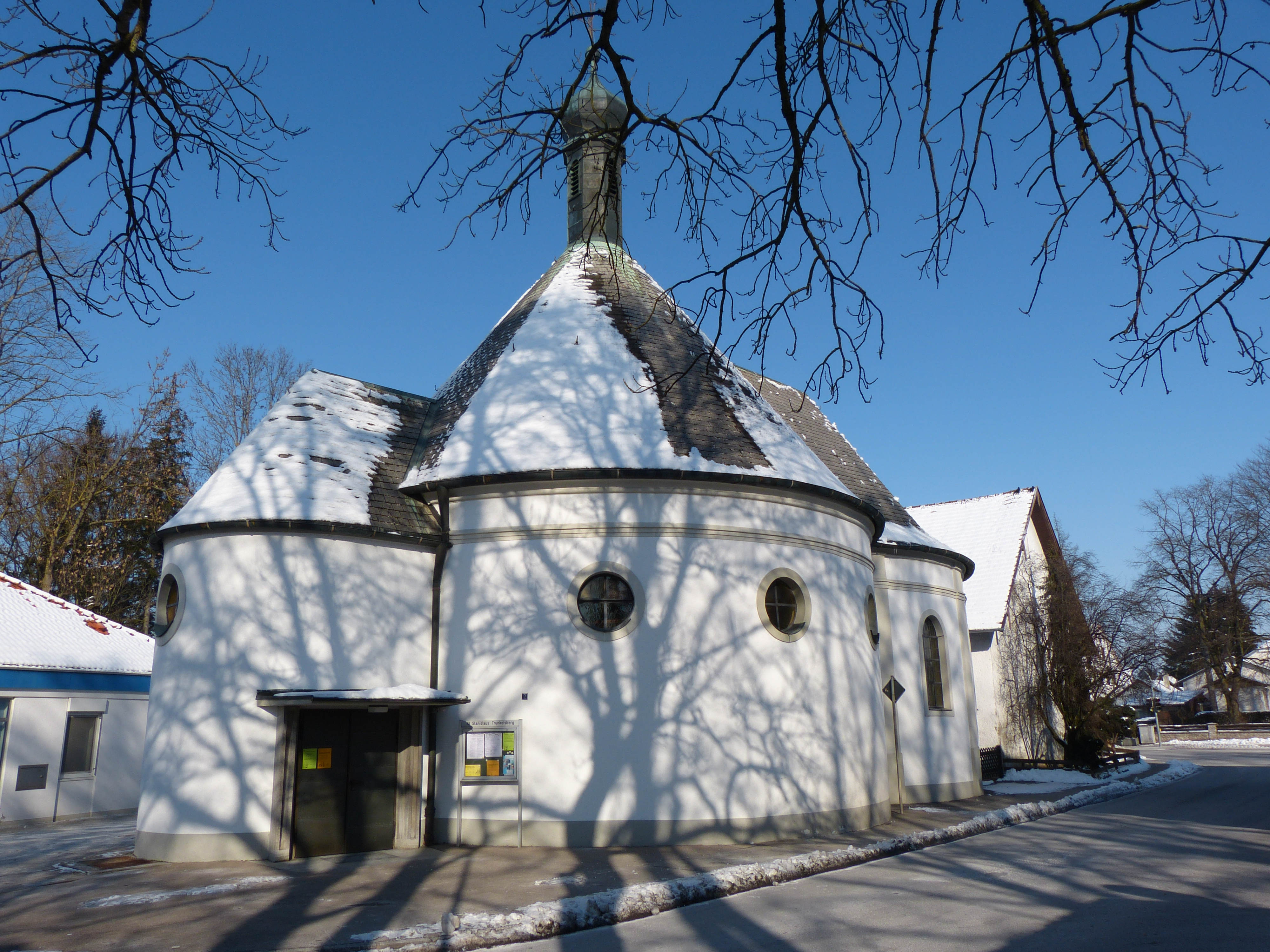 St. Stanislaus Kostka, Trunkelsberg, Landkreis Unterallgäu, Bayern